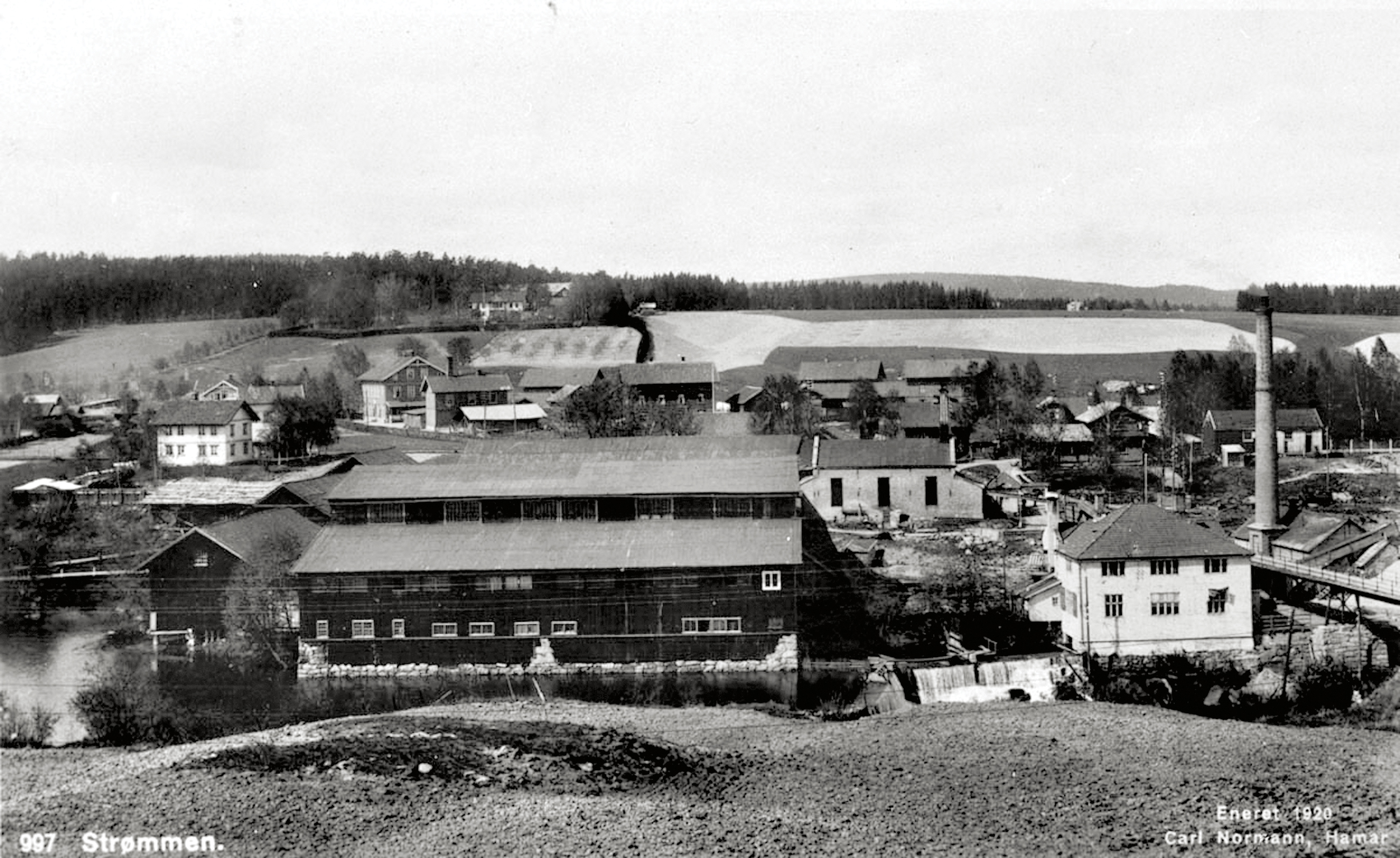 Fabrikkens søndre del med den store monteringshallen.